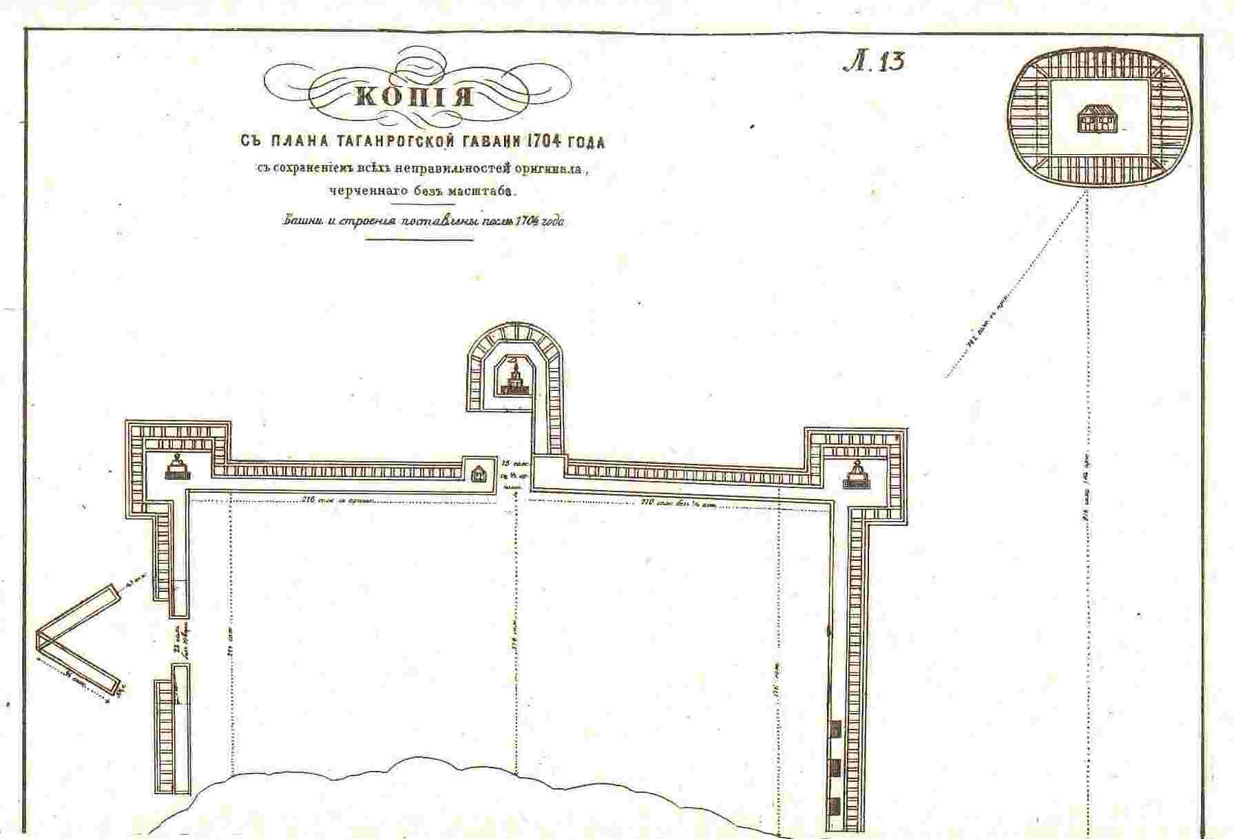 Таганрогская_гавань